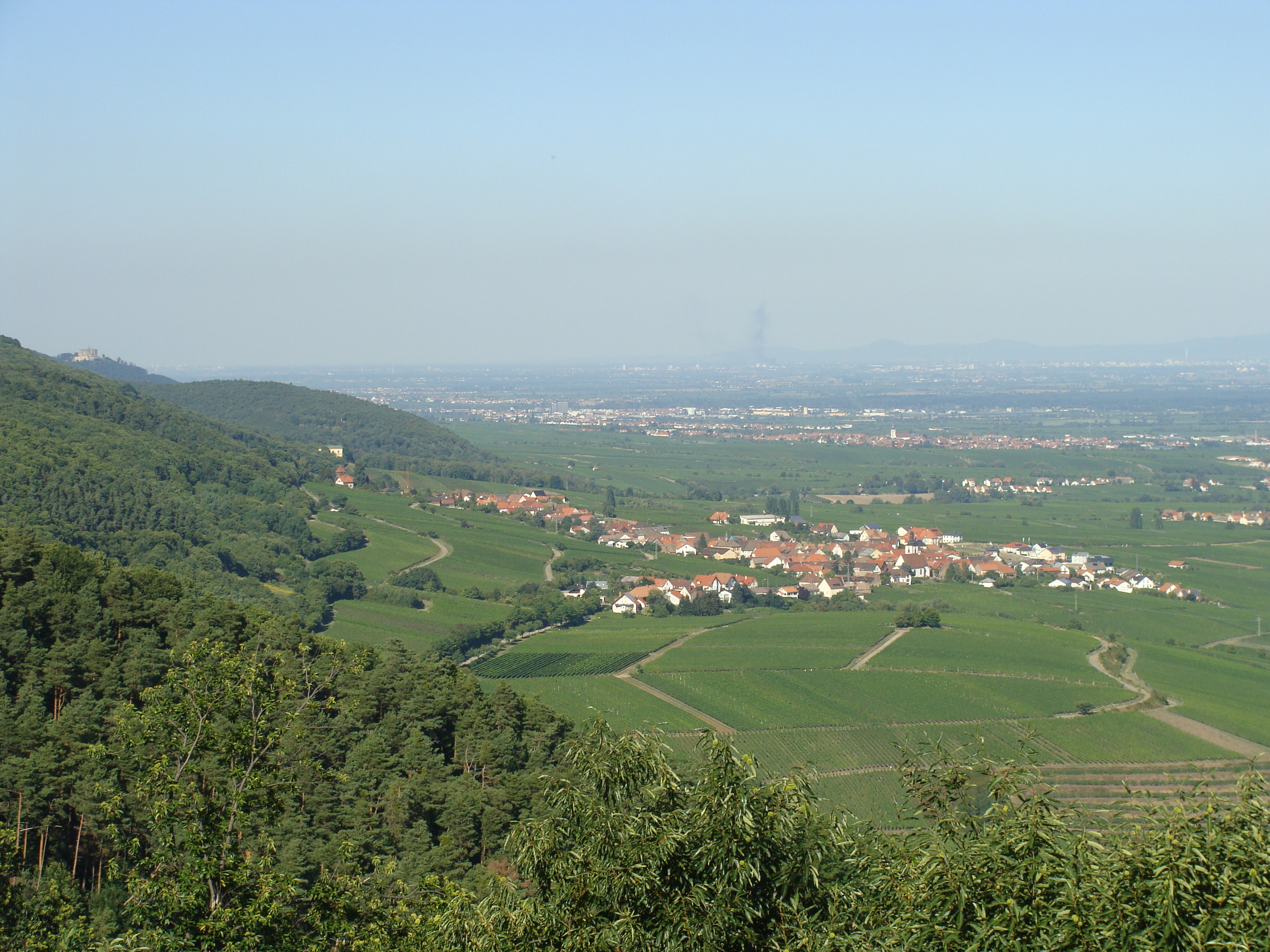 Weyher in der Pfalz (Blick vom Annaberg)